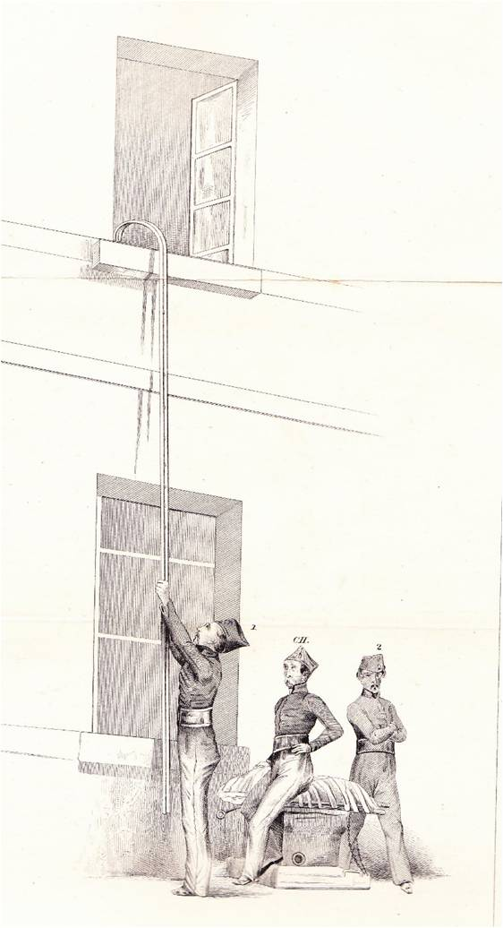 échelle à crochet créée par G. Paulin